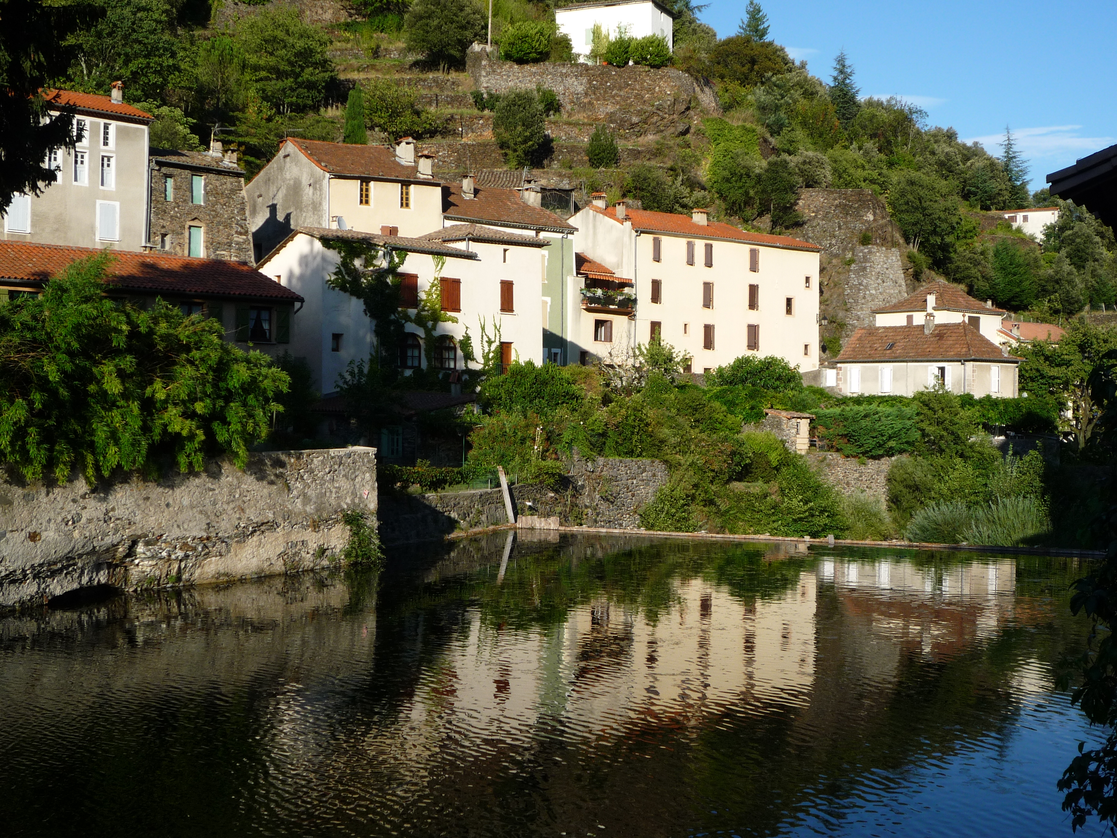 Vue de la rivière de l'Hérault et des maisons du village.